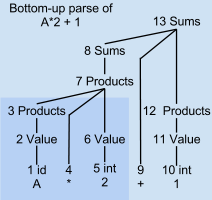 սդ